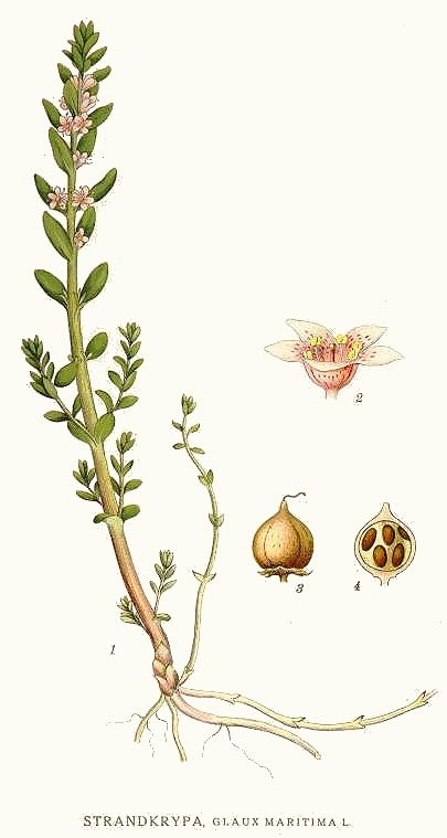 Original Description Strandkrypa, Glaux maritima L.